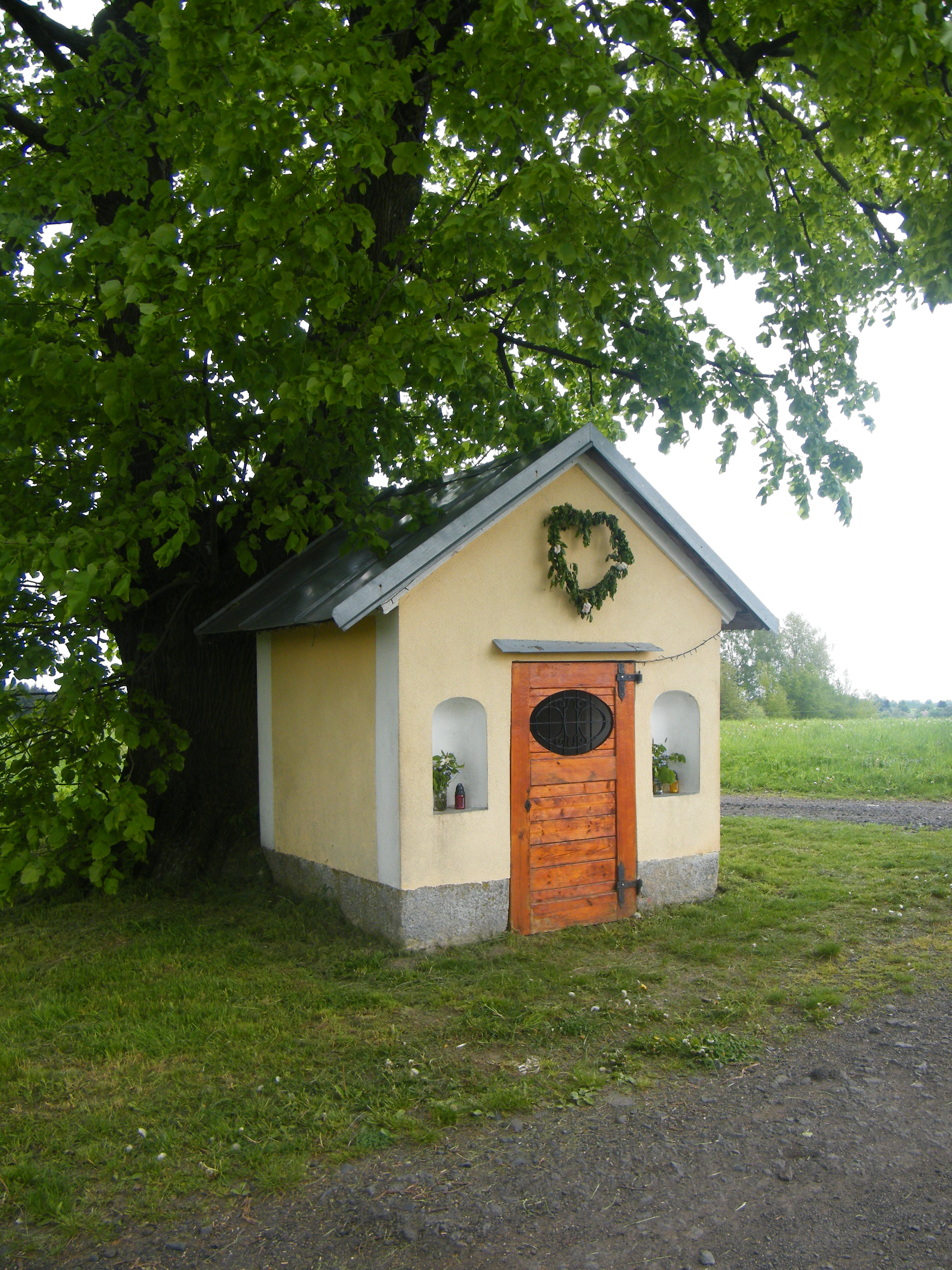 Kaple Nejsvětější Trojice na Sněžné, Krásná Lípa